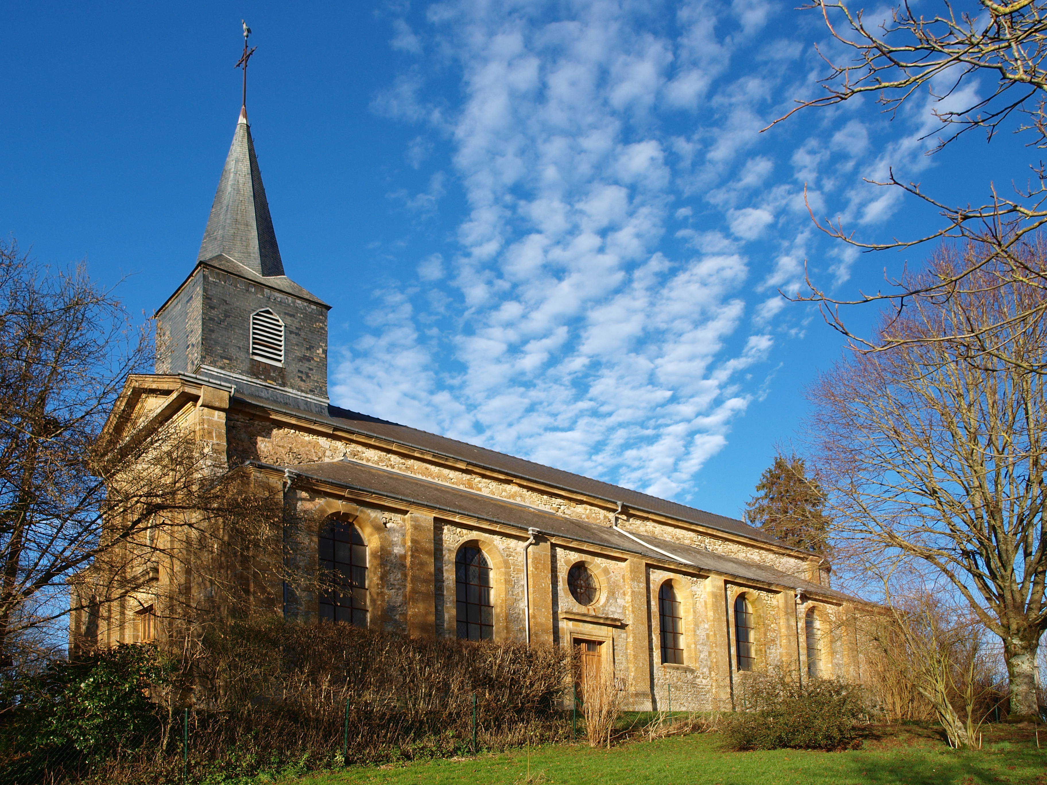 Chagny (Ardennes, France) ; l'église Saint Pierre. Ancienne église prieurale construite semblerait-il vers le du milieu du XVIIIe siècle. Un des bâtiments subsistant du prieuré porte les dates de 1740 et 1741 sur des éléments de sa charpente. Le prieuré de Chagny aurait été fondé par l'archevêque Foulques, 33e titulaire du siège de Reims (882-900), et resta attaché à abbaye de Saint-Remi jusqu´à sa suppression vers 1780. Réf